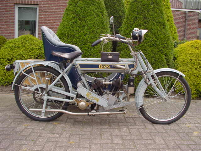 Clyno 5-6 hp (750cc) V-TWIN del 1912